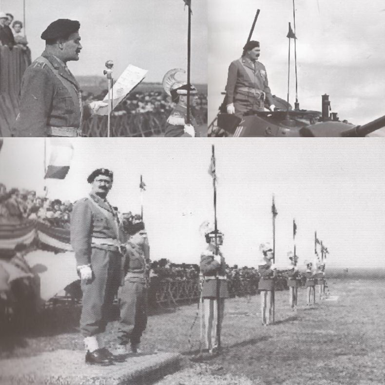 Il 62° Colonnello Comandante di Piemonte Cavalleria, Carlo Francesco Gay, già fondatore e guida dello Squadrone"Folgore"